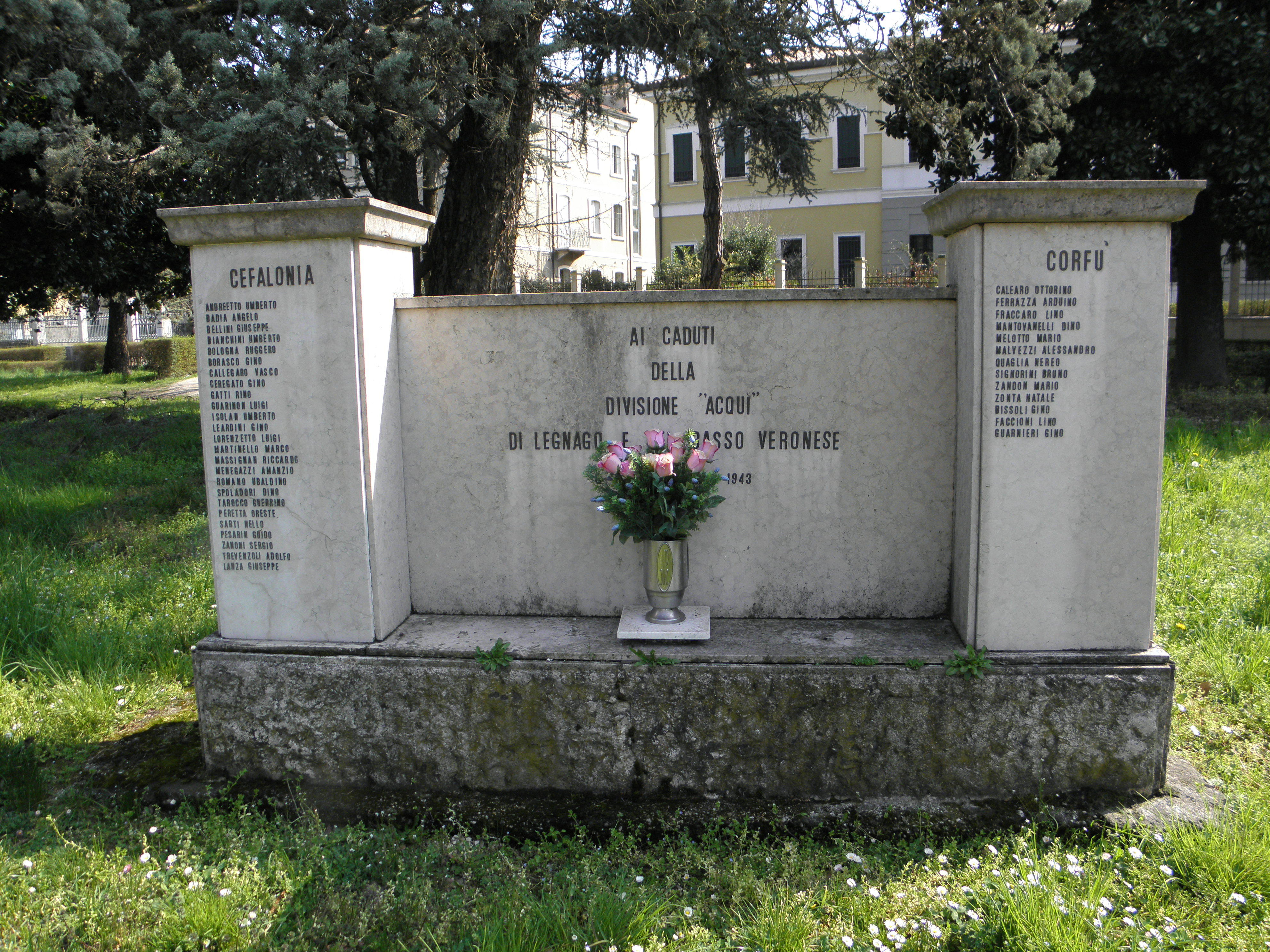 Legnago, via XX settembre: il monumento dedicato ai caduti della Divisione Acqui durante la seconda guerra mondiale.